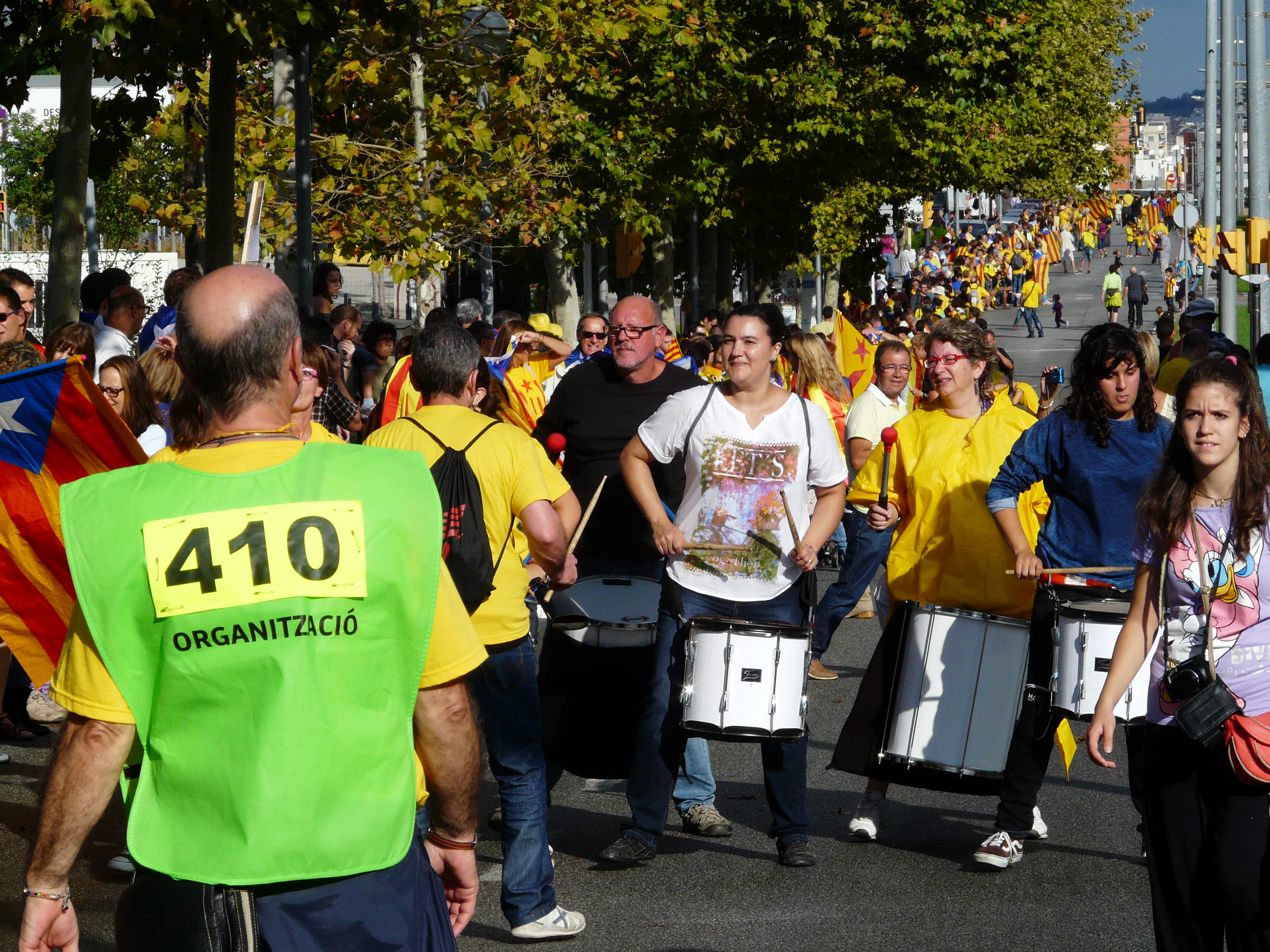 Via Catalana per la Independència. Abans, durant i després de la Via, a Barcelona i el Baix Llobregat.